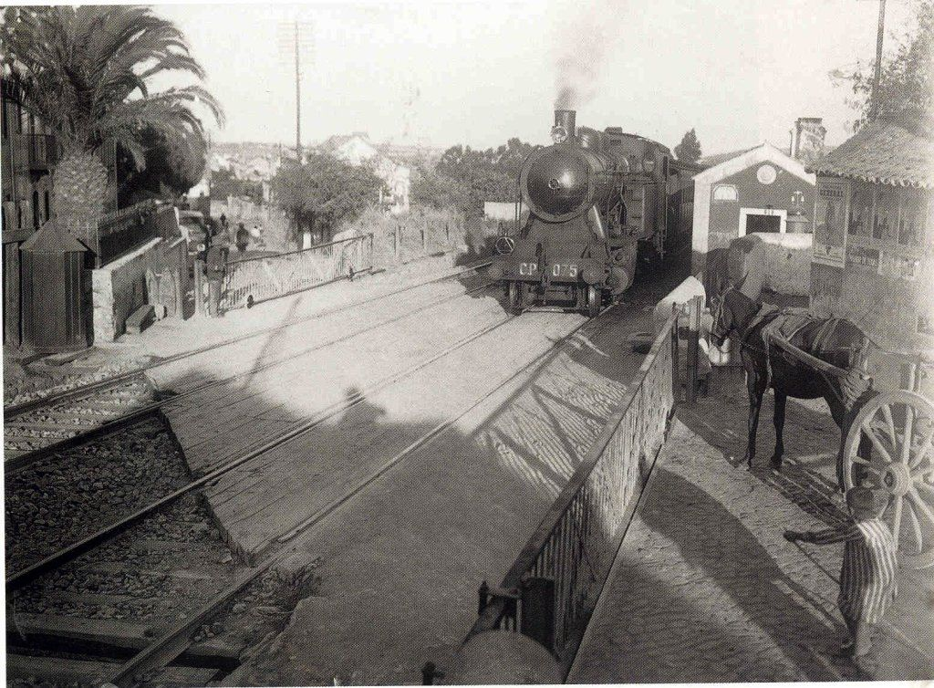 Passagem de nível da Amadora, Portugal.